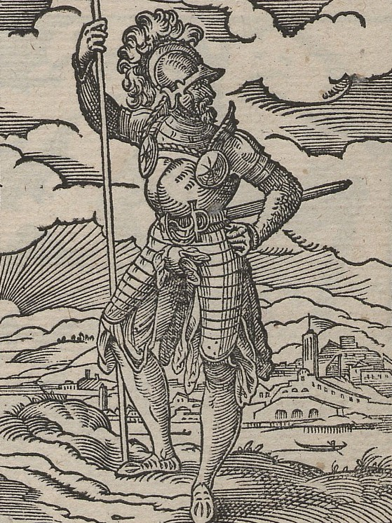 Original image description from the Deutsche Fotothek Ständebuch & Amt & Militär & Rottmeister